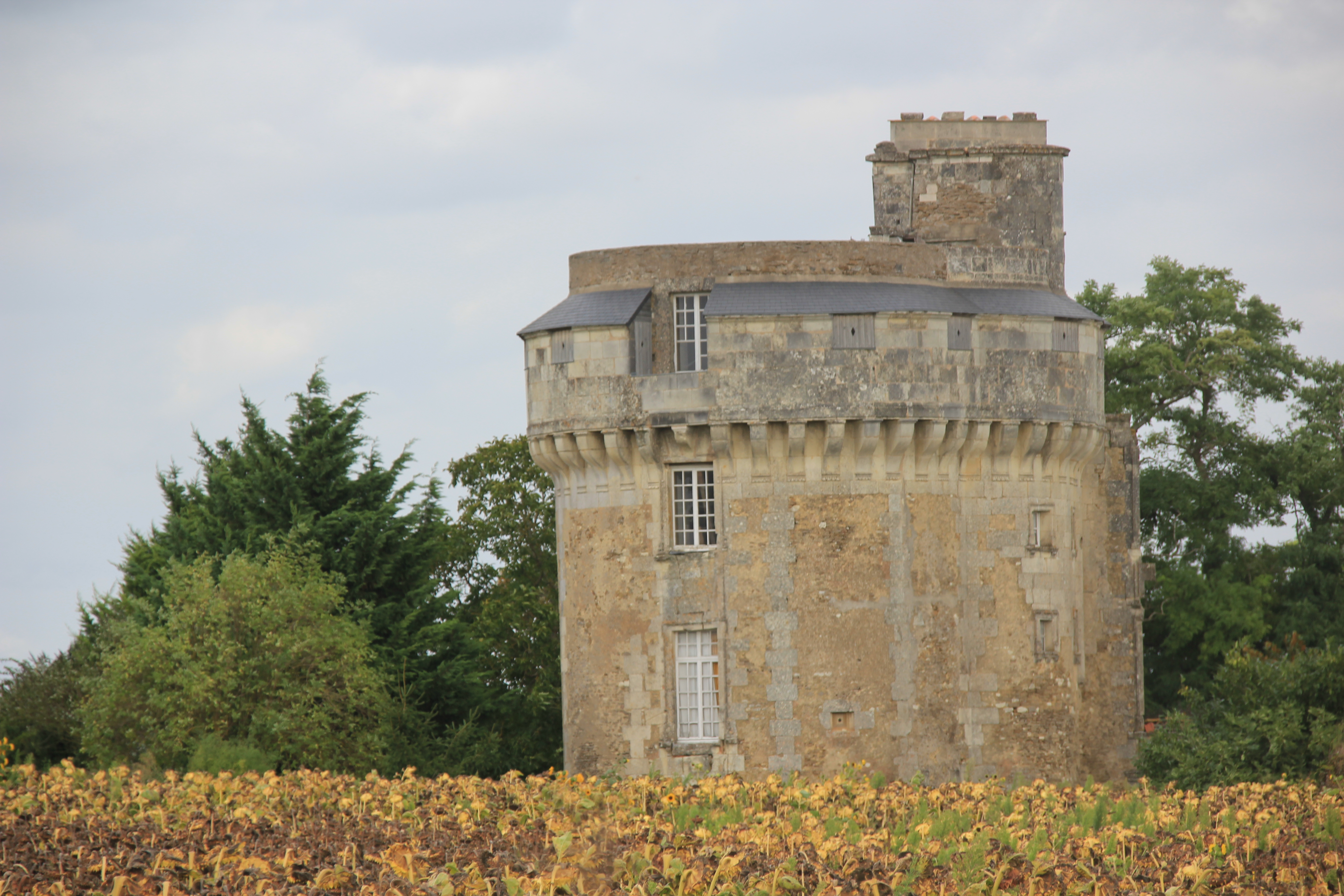 La tour du Château d'Abain (Thurageau (Inscrit) .